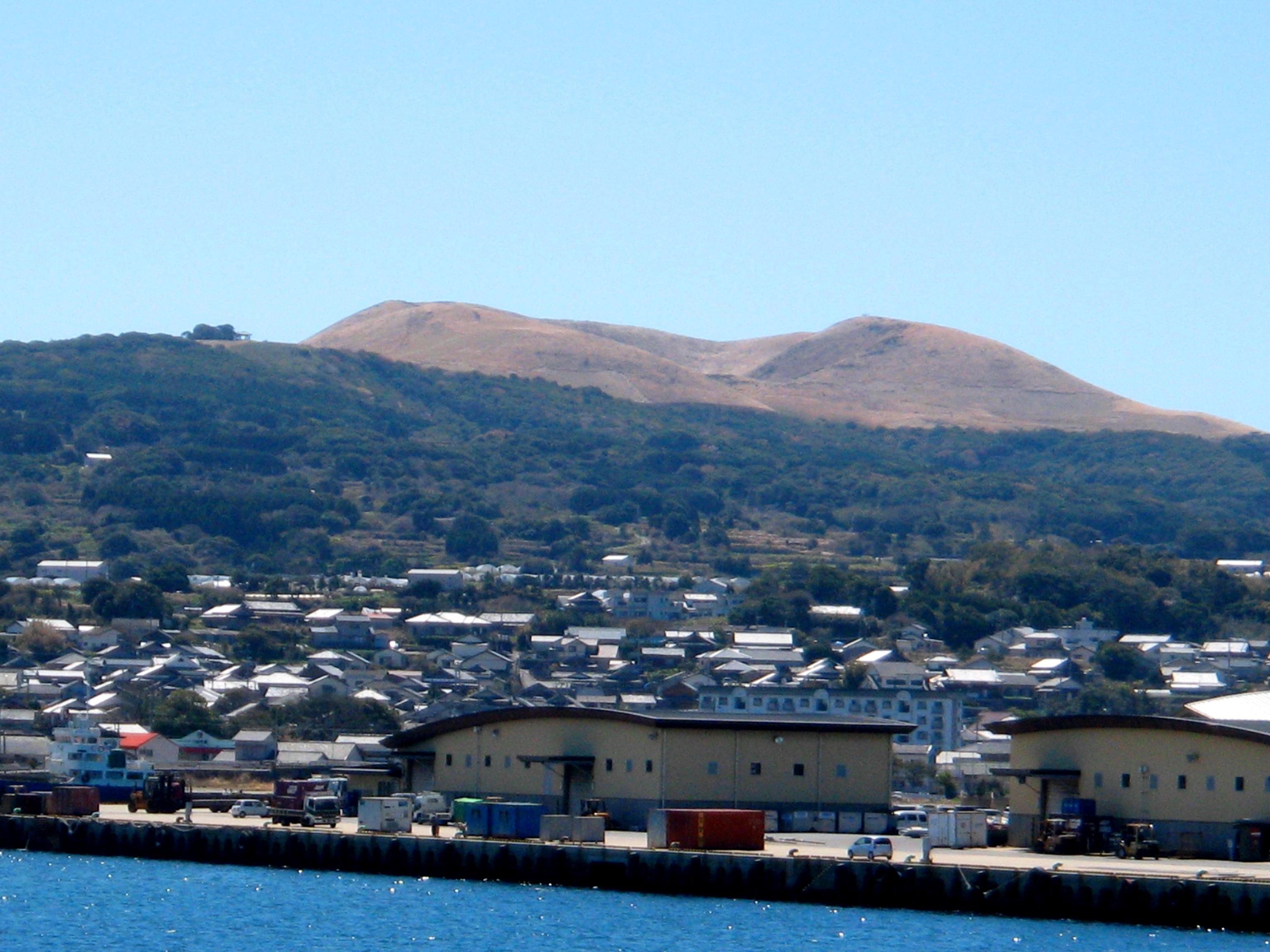 五島市東浜町